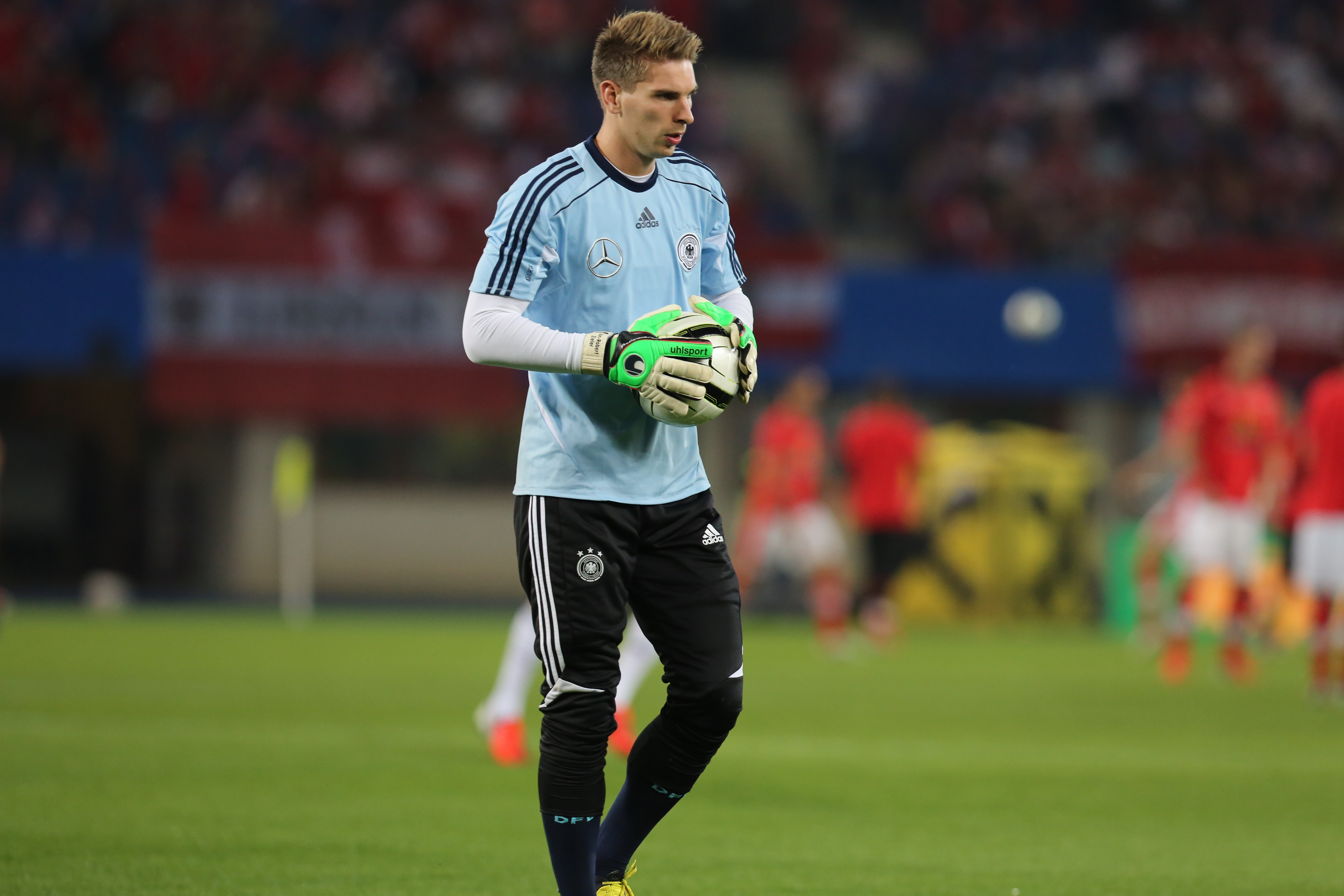 Fußball-Weltmeisterschaft 2014/Qualifikation (UEFA), Gruppe C, 11. September 2012, Österreich gegen Deutschland im Wiener Ernst-Happel-Stadion. The making of this work was supported by Wikimedia Austria. For other files made with the support of Wikimedia Austria, please see the category Supported by Wikimedia Österreich.